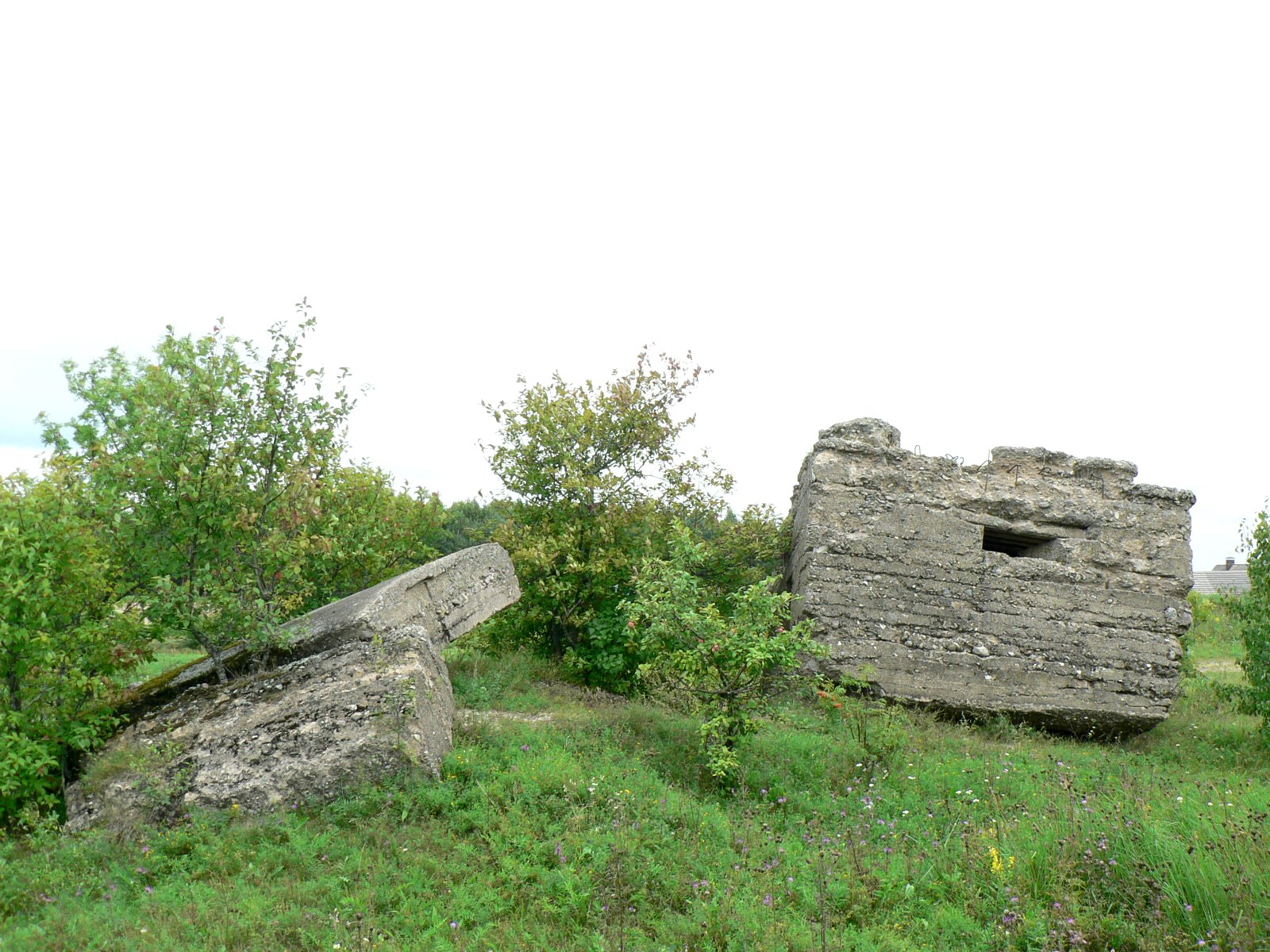 Беларуская (тарашкевіца): Разбітыя парэшткі нямецкага бункера І Сусьветнай вайны на ўскрайку вёскі Наносы, што месціцца над Нараччу.